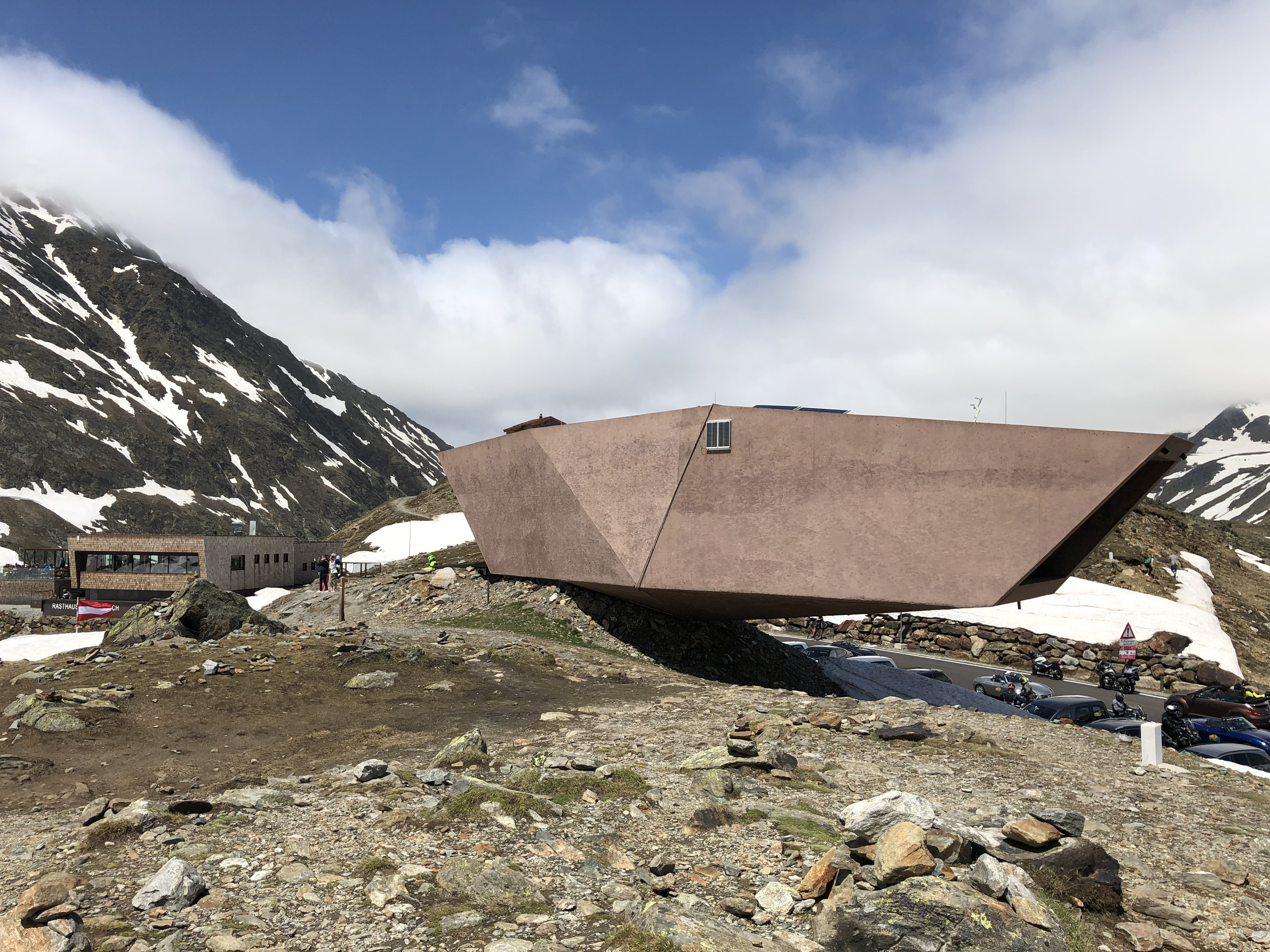 SAussichtsplattform auf der Passhöhe Timmelsjoch